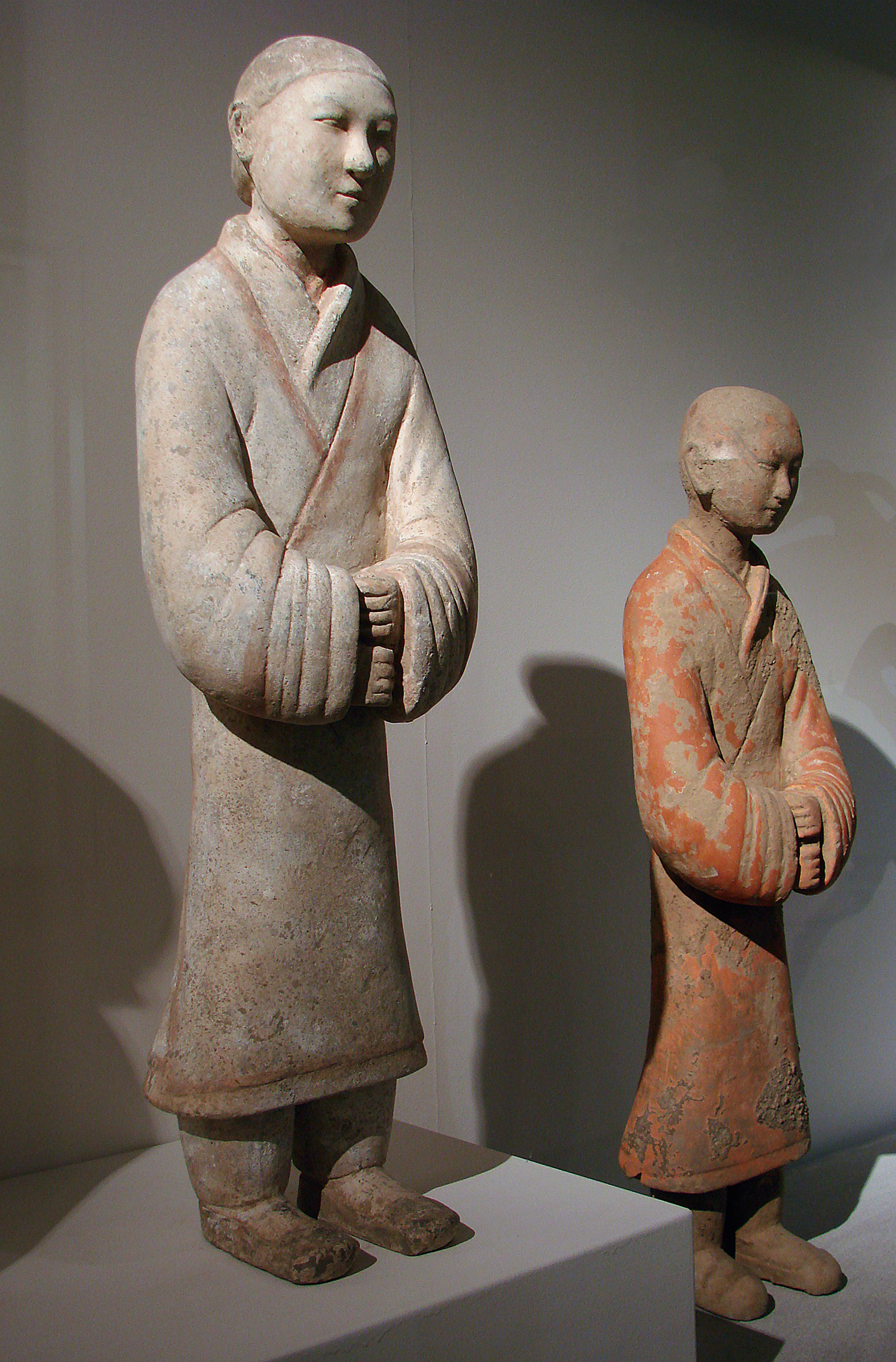 Deux serviteurs, une femme et, au 2ème plan, un jeune homme. Chine du Nord, Shaanxi, dynastie Han, 2ème siècle - JC. Terre cuite, engobe blanc et polychromie. Musée Guimet, Paris.